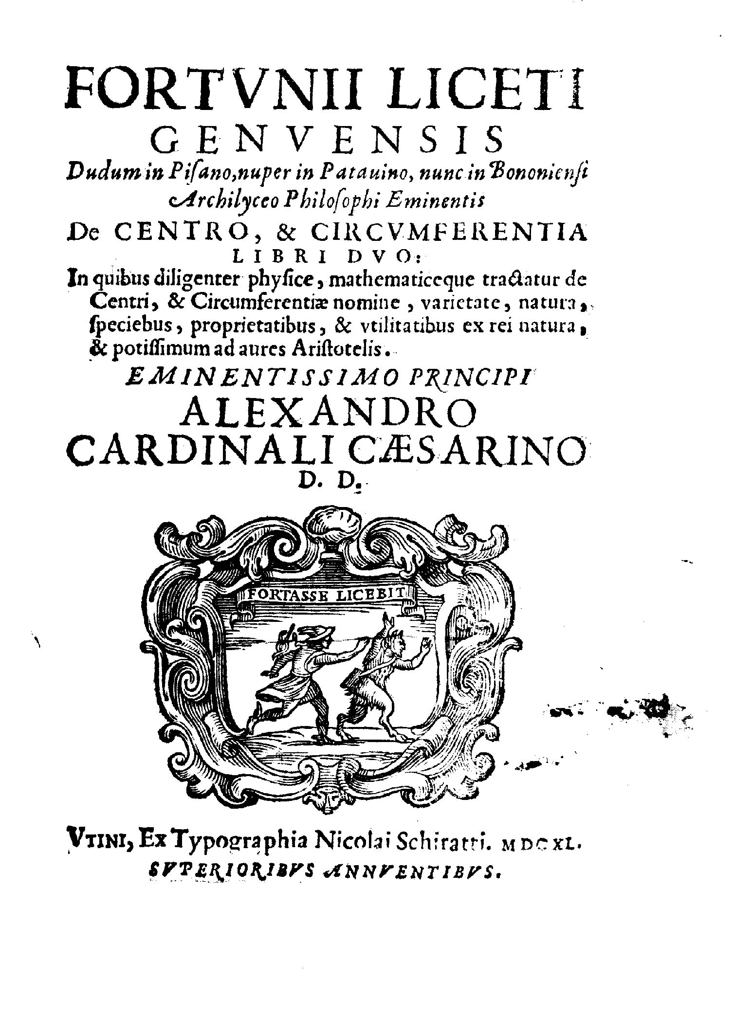 Fortunij Liceti Genuensis ... De centro, & circumferentia libri duo: in quibus diligenter physice, mathematiceque tractatur de centri, & circumferentiae nomine, varietate, natura, ... & potissimum ad aures Aristotelis. …. - Vtini : ex typographia Nicolai Schiratti, 1640. - [12], 114, [2] p. : ill., 1 ritr. ; 4º. - Esemplare mutilo del fascicolo b2 .